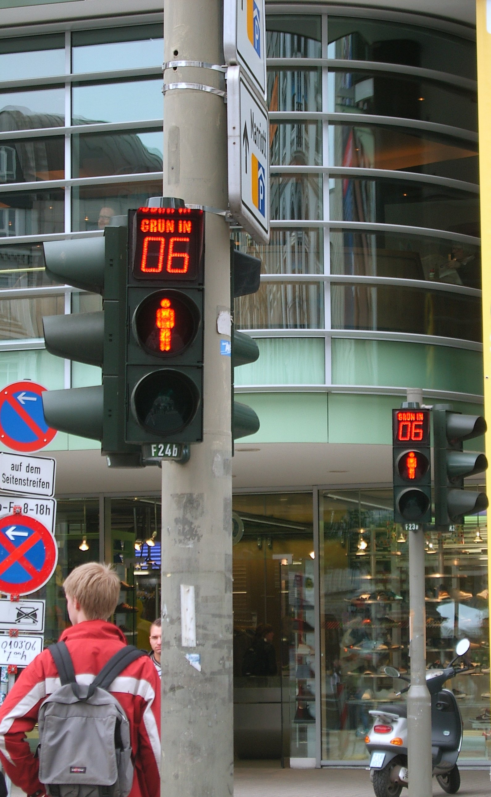 Restzeitampel am Gänsemarkt in Hamburg.